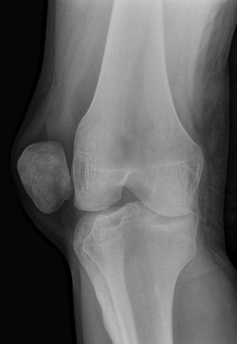 Patellaluxation im Röntgenbild. Rechtes Knie.